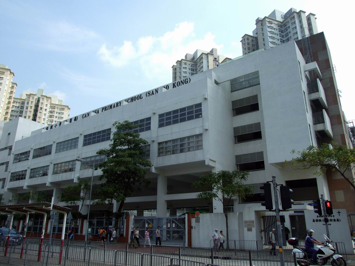 嘉諾撒小學 (新蒲崗)